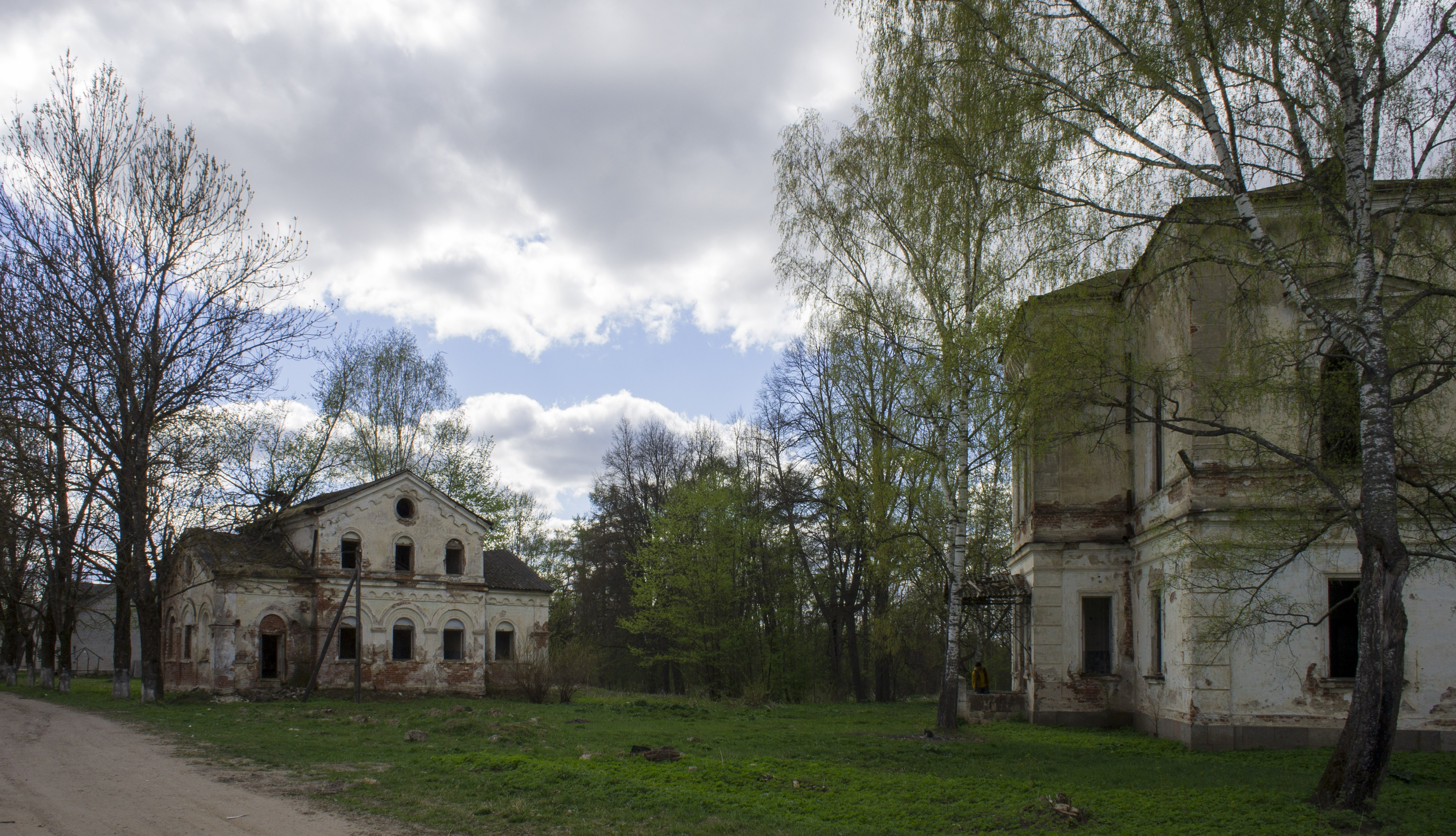 Усадьба «Ладьино» (Тверская область, Старица, деревня Ладьино)